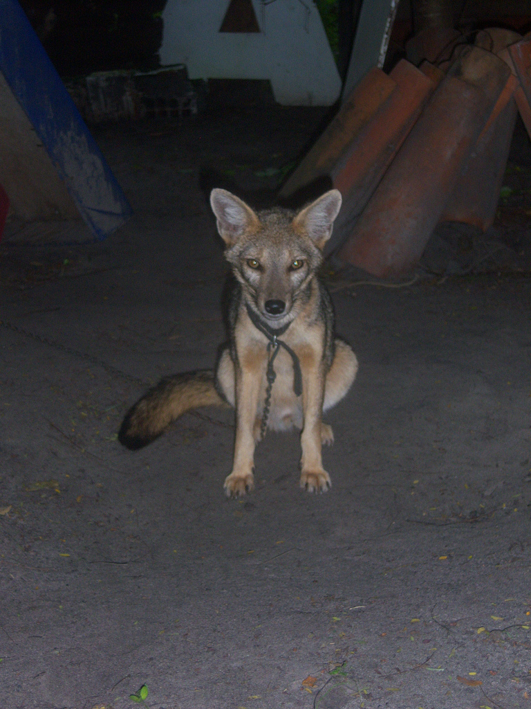 Uma raposa domesticada no interior do Ceará